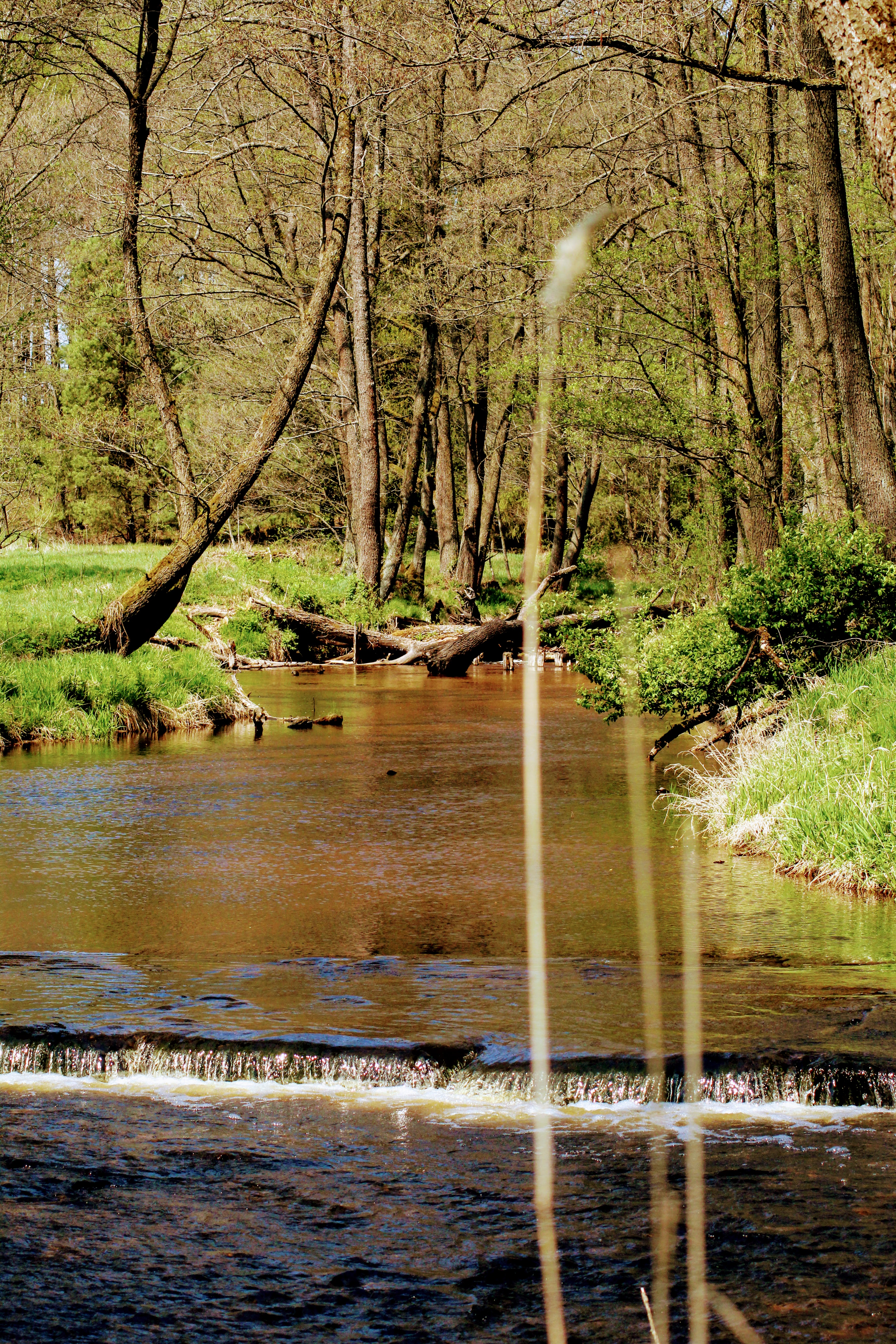 przejazd rzeczny przez rzekę.